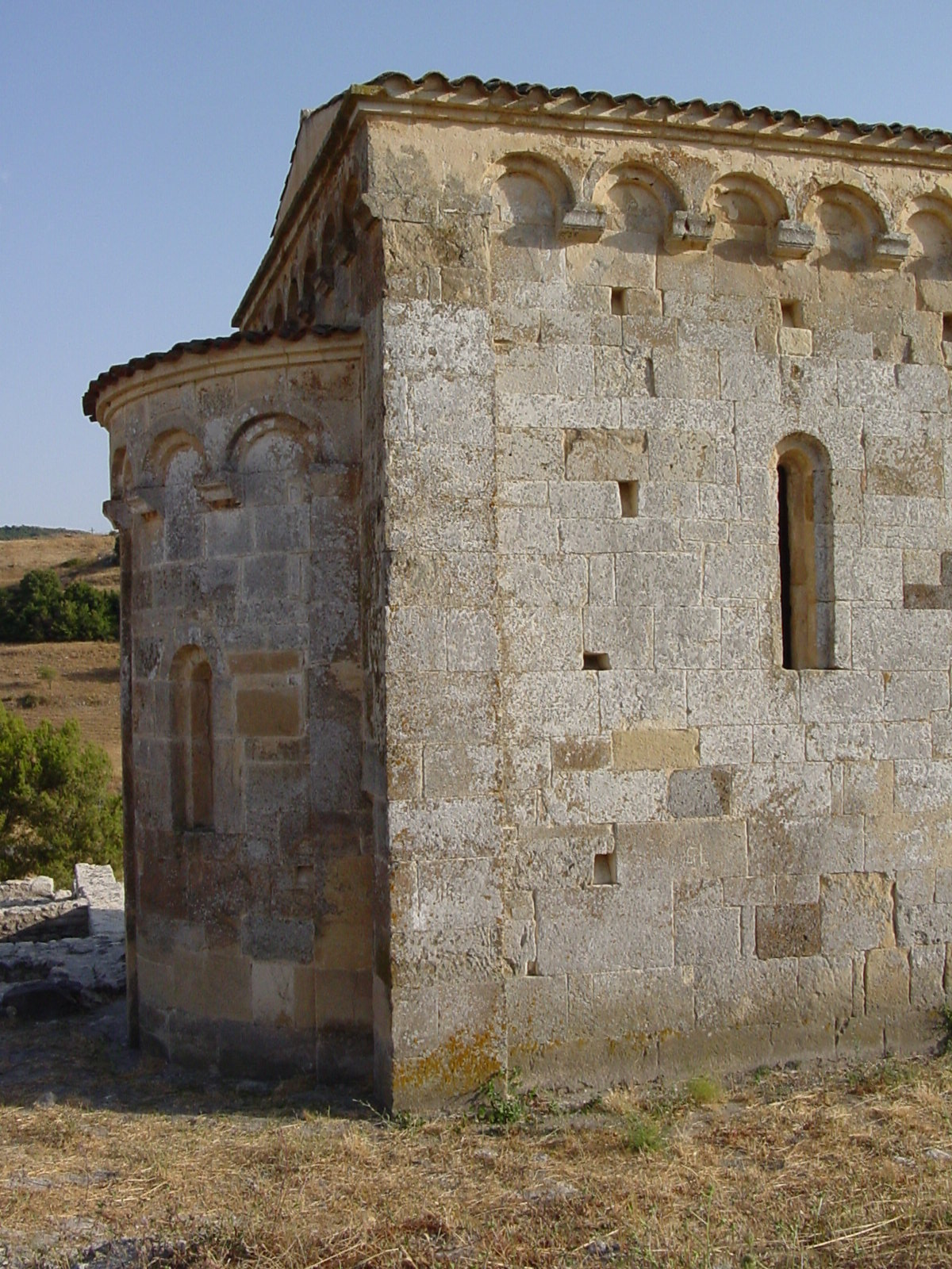 San Nicola di Truddas (o Trullas) Semestene (SS). Particolare dell'abside